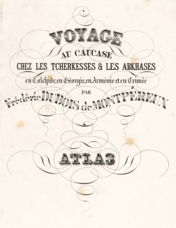 Титульный лист Атласа иллюстраций.